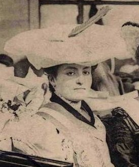 Rosina Ferro-Pia Reine du Marché de Porta Palazzo à Turin photographiée à son arrivée à Paris pour participer aux fêtes de la Mi-Carême 1905.